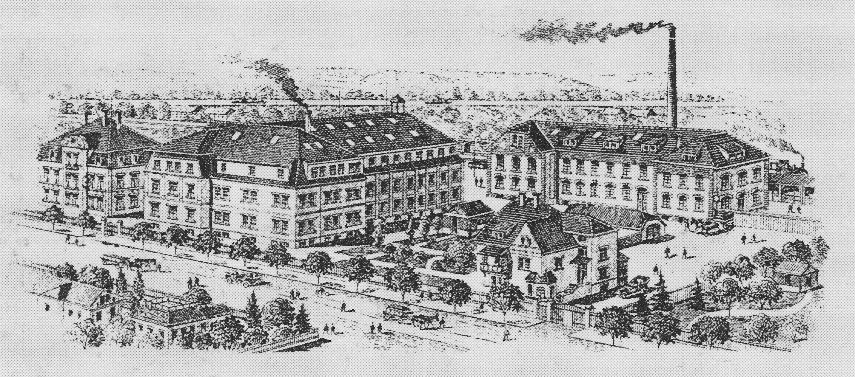 Radebeul, historisches Schaubild auf einem Briefkopf 1915, Villa mit Produktionsgebäude Wilhelm Hofmann